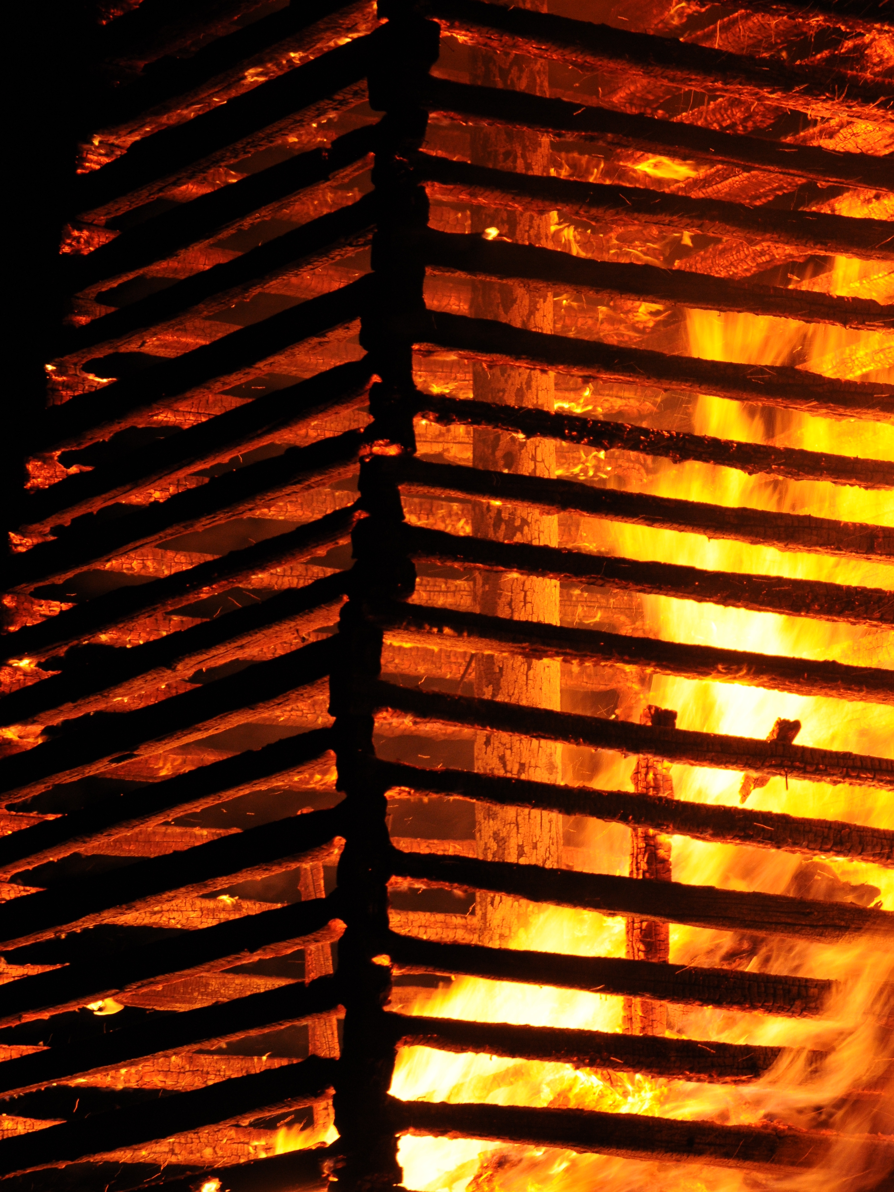 das traditionelle Funkenfeuer an der Bödelestraße, Höhe Sandkurve in Dornbirn.